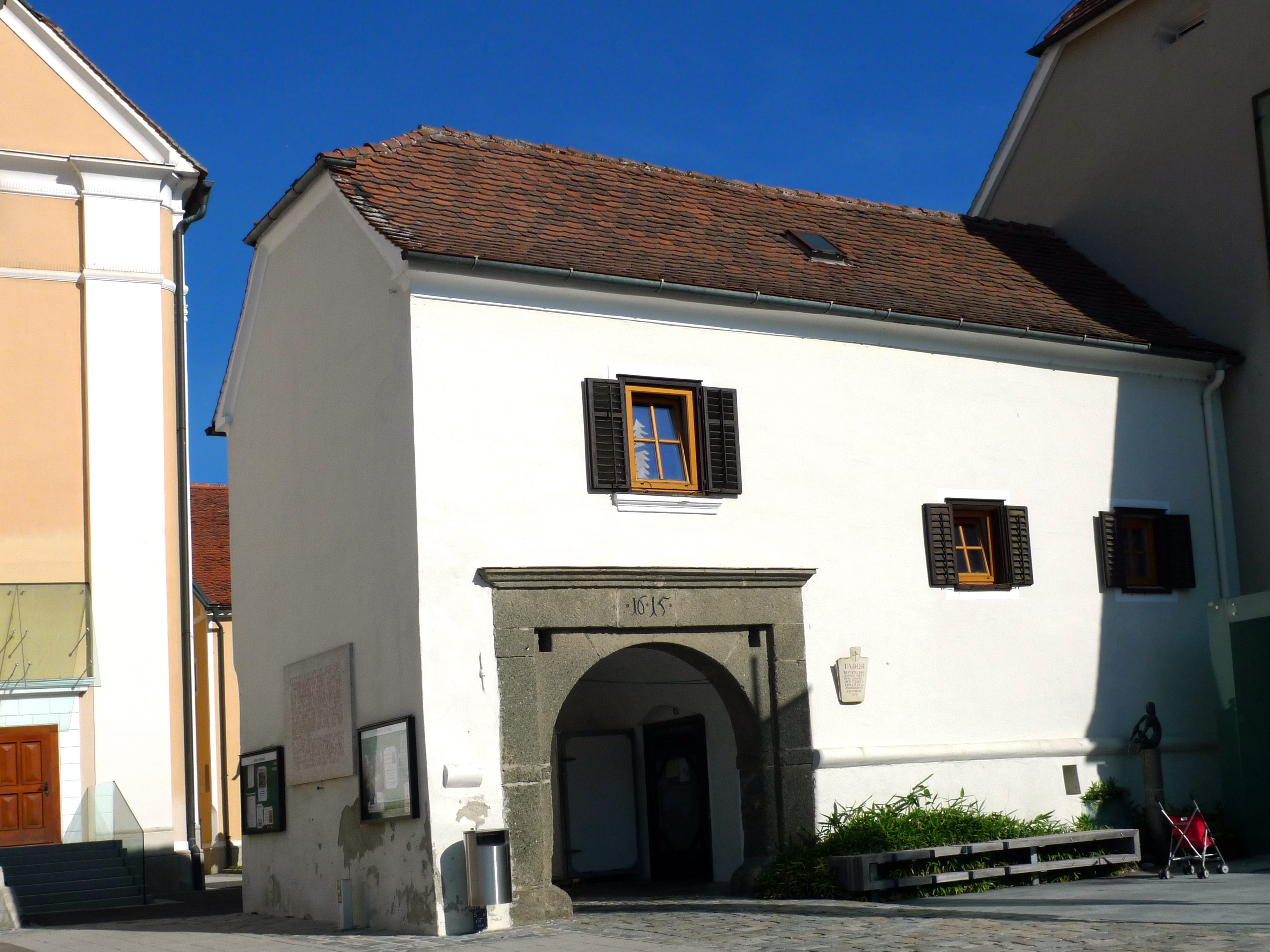 Bastion